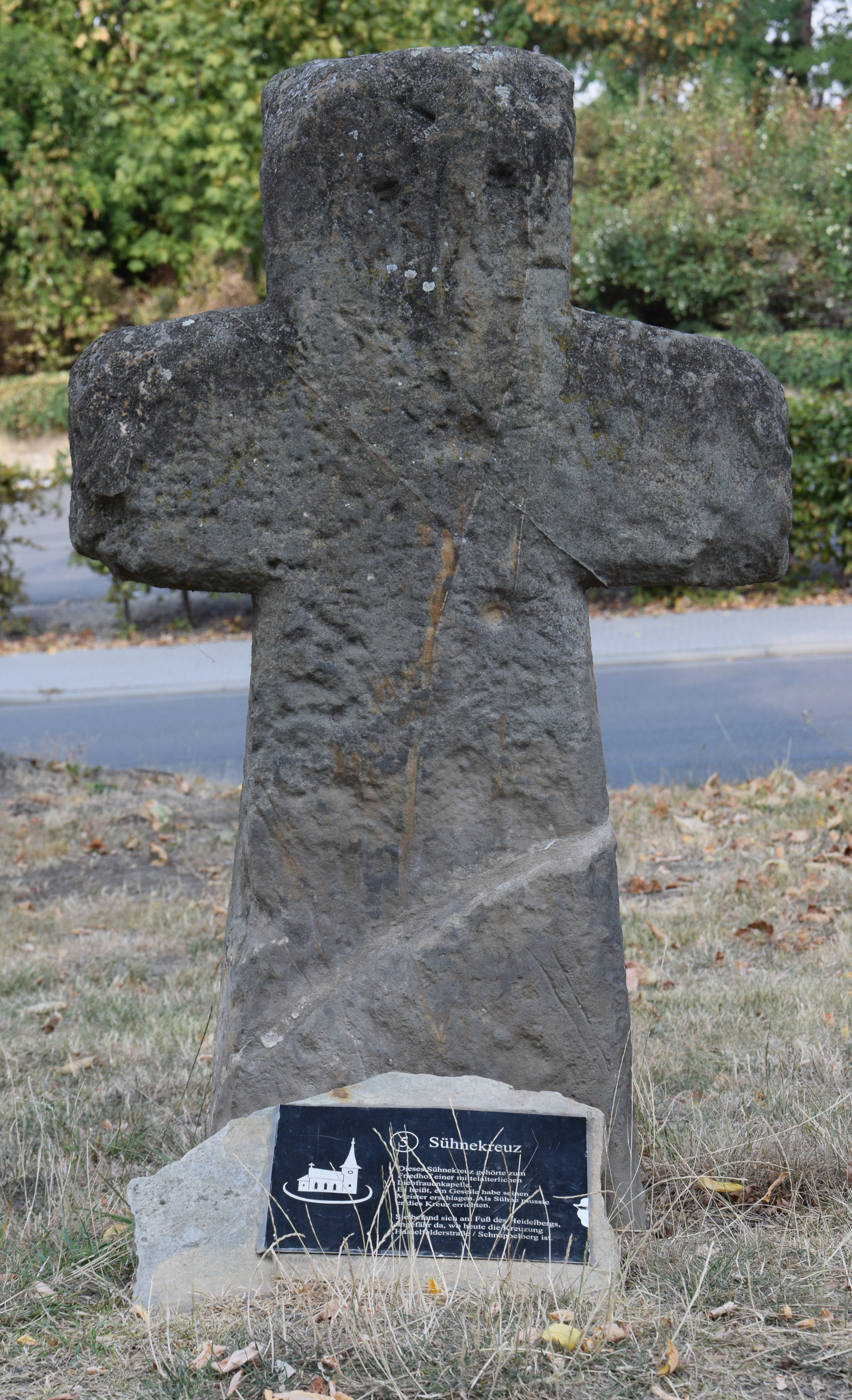 Kleindenkmal Sühnekreuz in Blankenburg